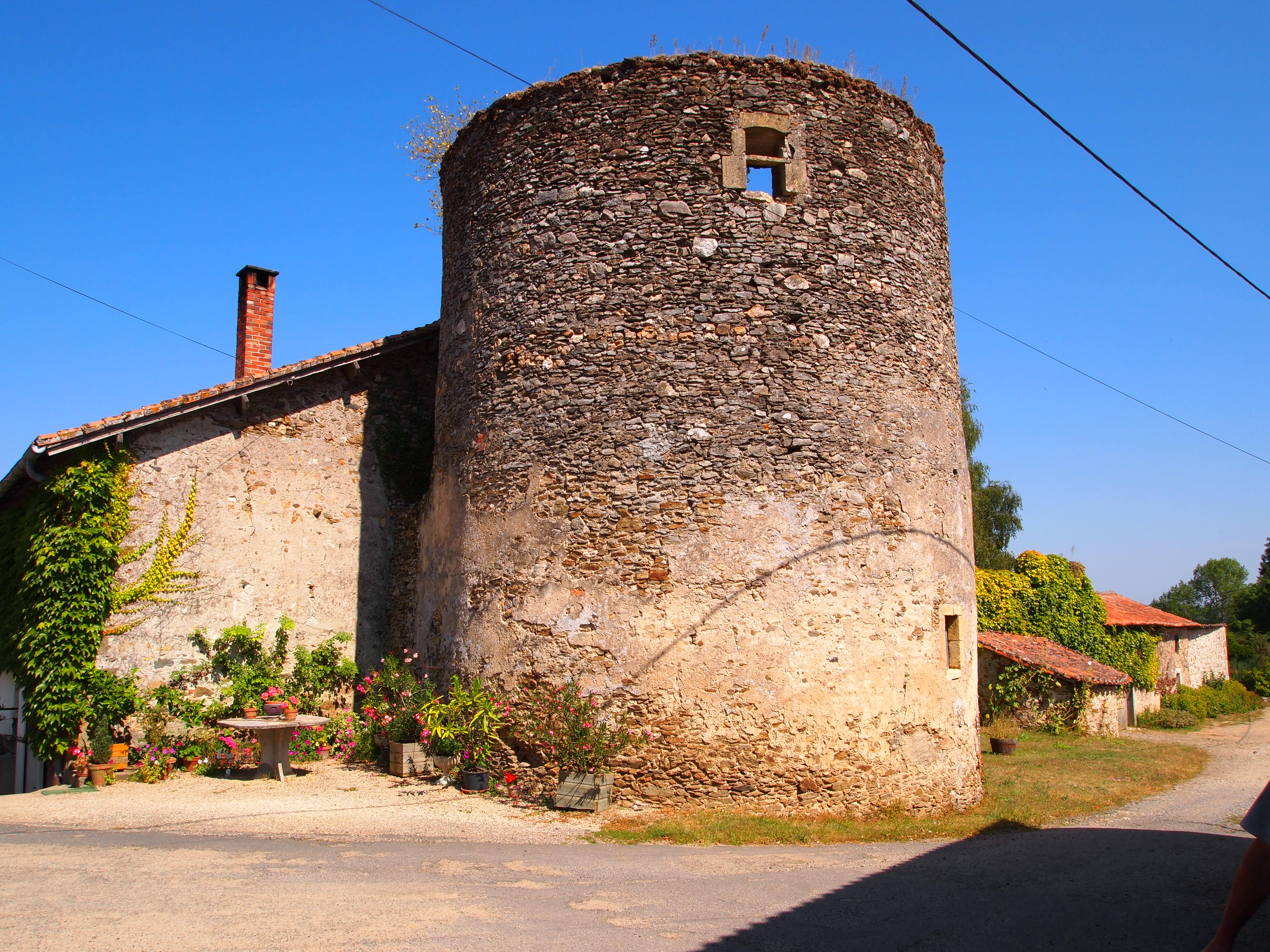 Pigeonnier du logis de la Villatte à Ansac-sur-Vienne en Charente (inscrit, 1991)